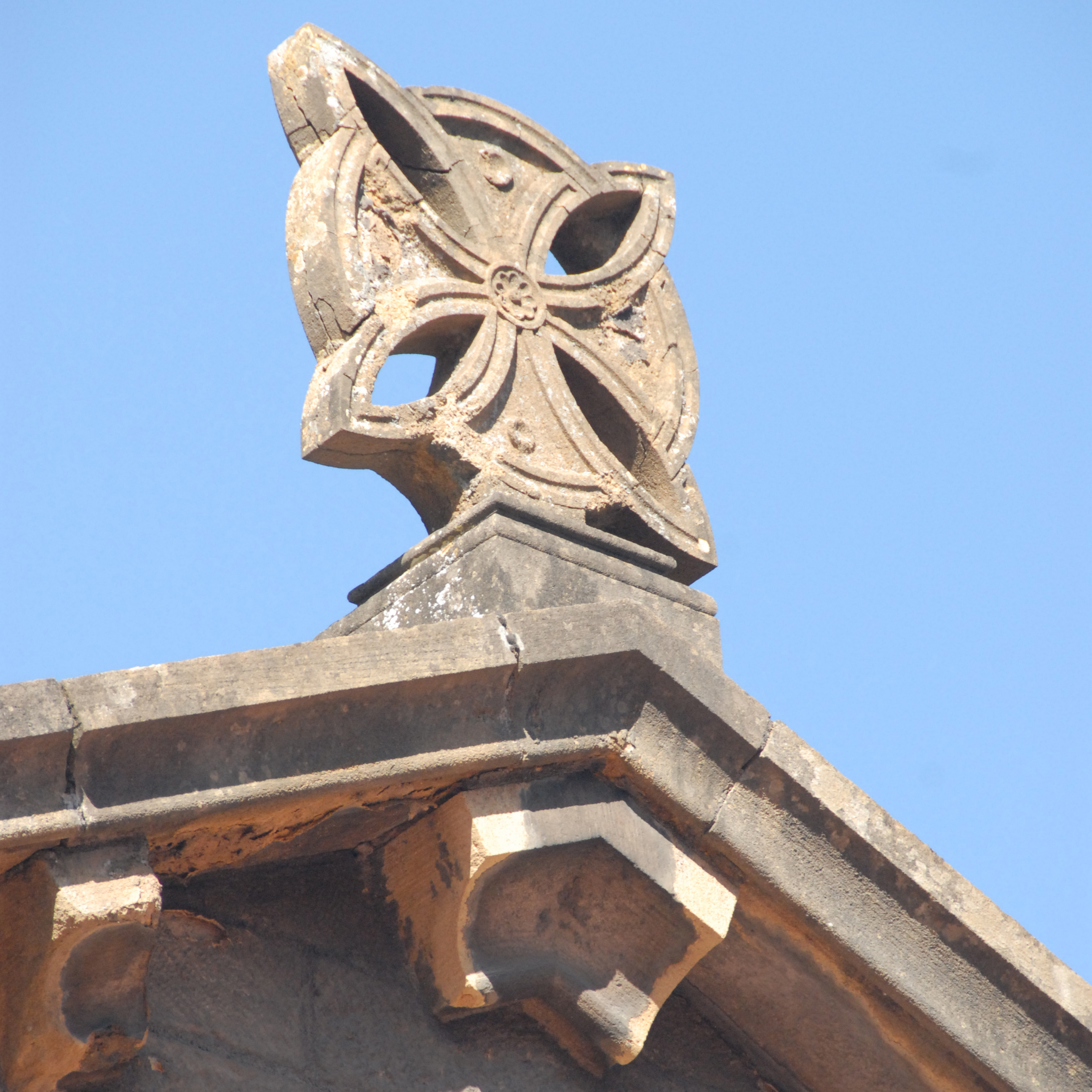 Rosette aus First Kranzkapelle